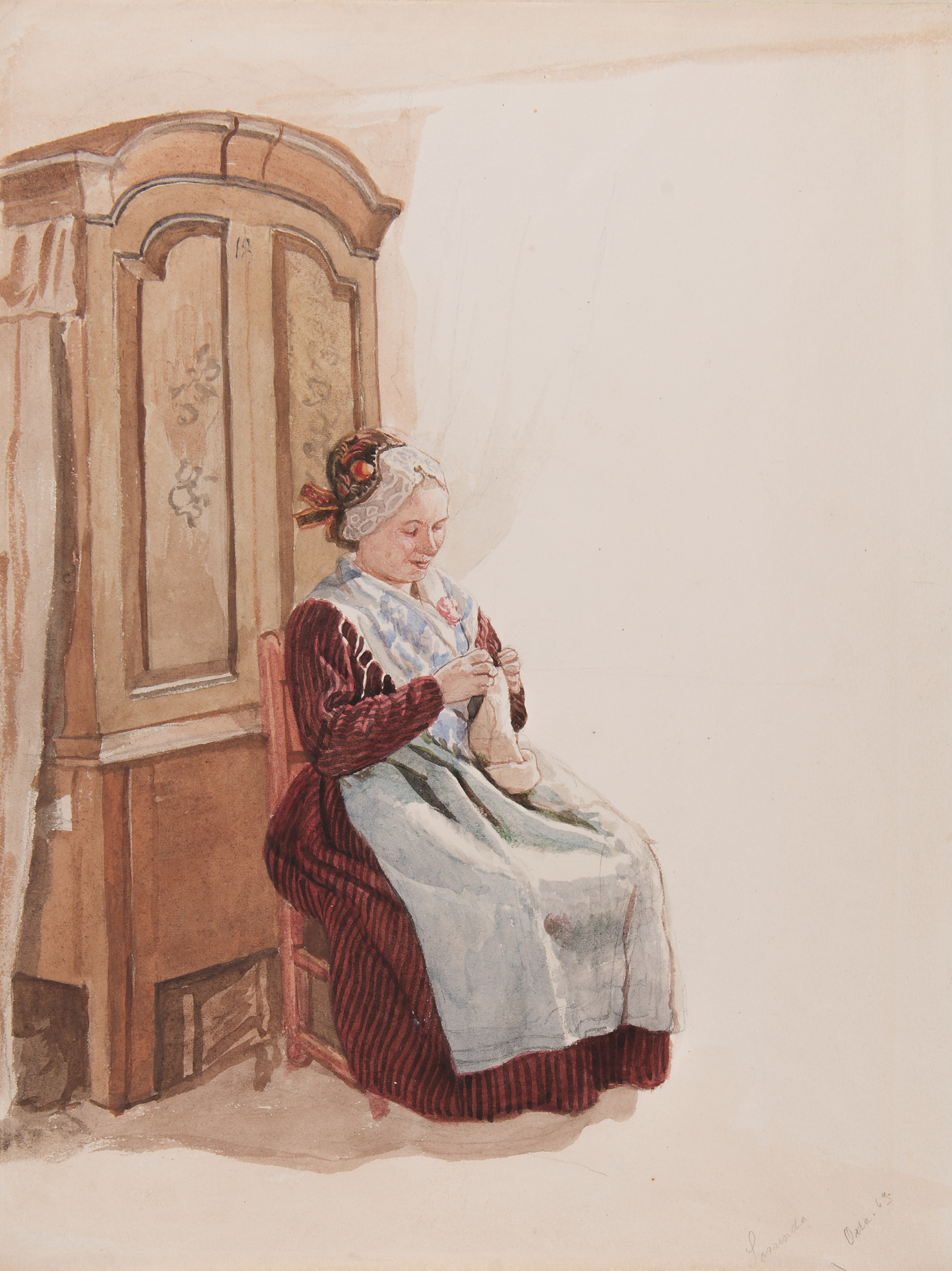 Dräkt. Handarbetande kvinna i helfigur sittande framför ett skåp. Akvarell i storformat föreställande av A.J.G Virgin Depicted place: Q10674110 (Q10674110) (Härad), Sorunda (Ort), Sorunda socken (Q10674049)